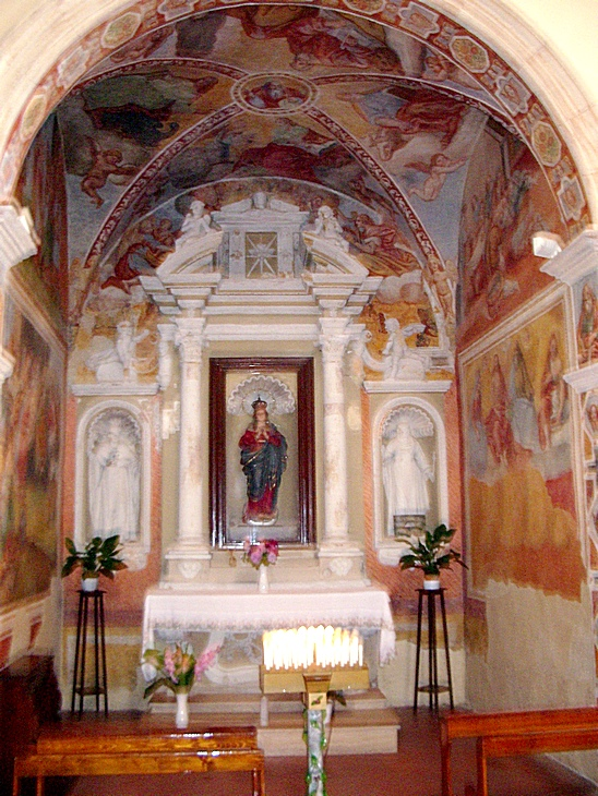 Affreschi nella Chiesa di San Bartolomeo a Castell'Ottieri (GR), Tuscany (Italy)